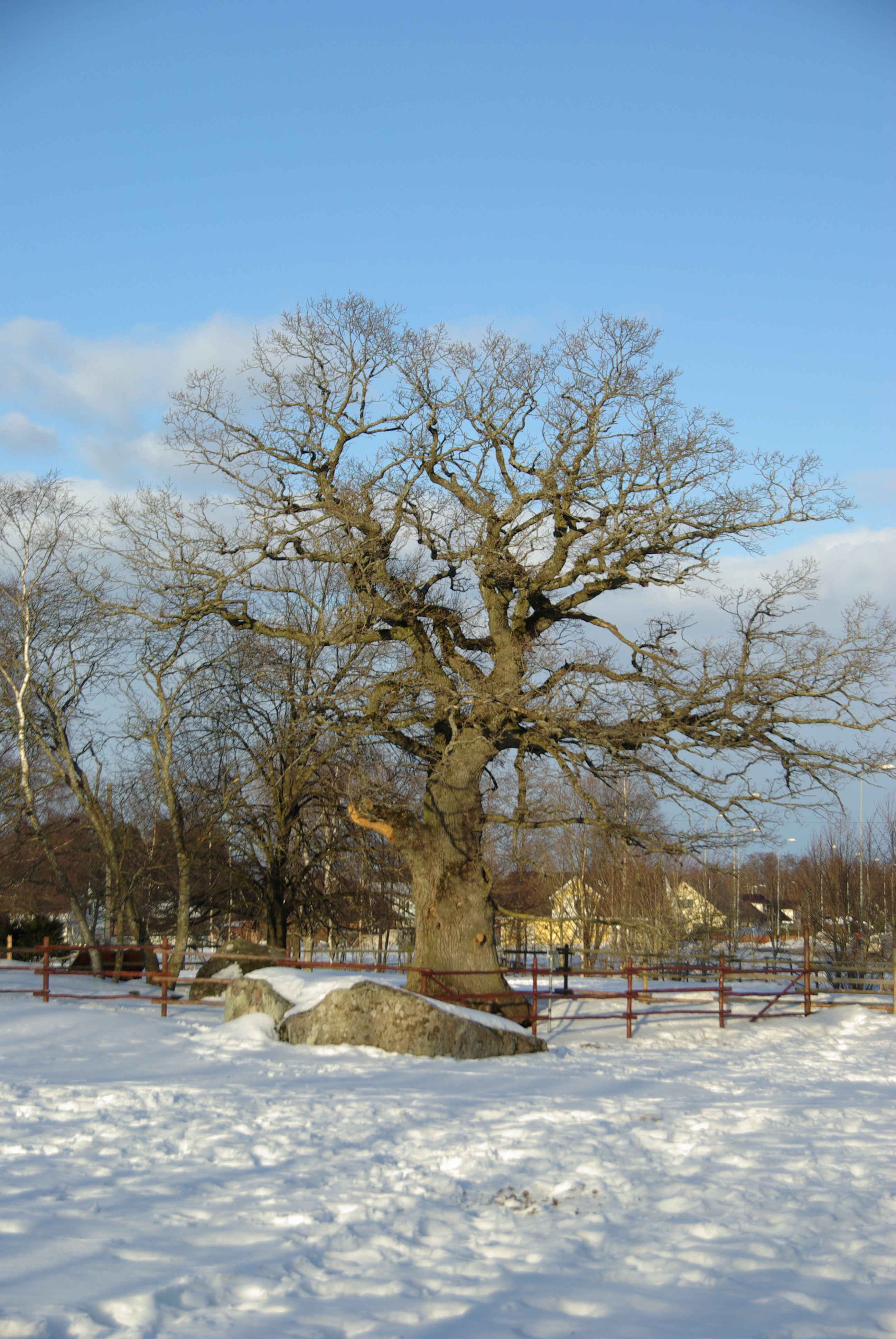 Asub Harjumaal Viimsi vallas Metsakasti külas